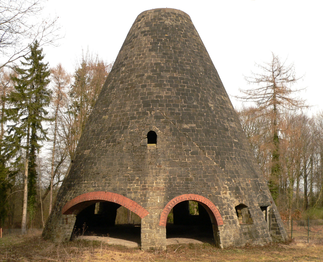 Glasturm Steinkrug